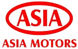 Logo der Asia Motors